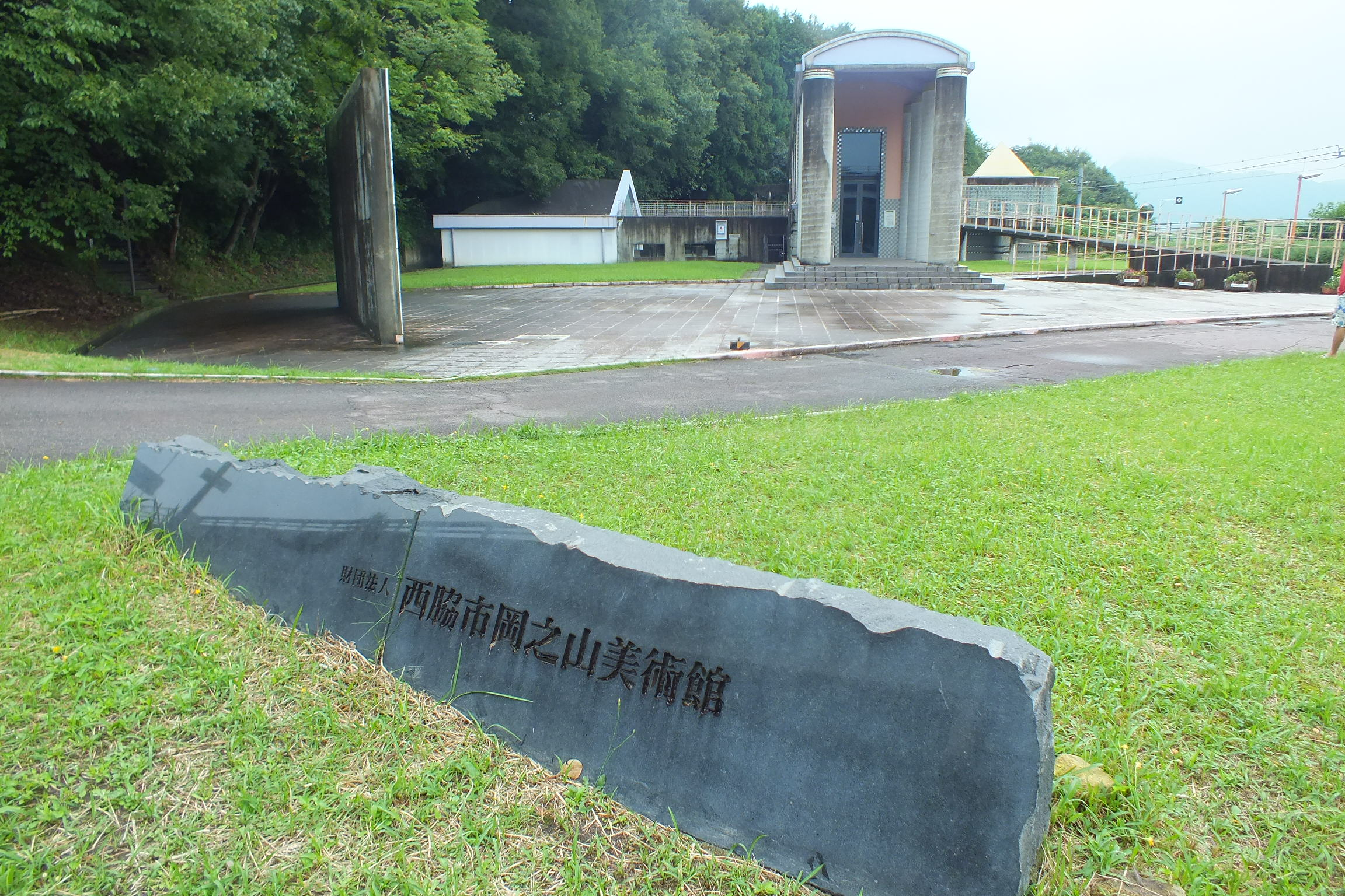 2015-09-06 Okanoyama museum-岡之山美術館